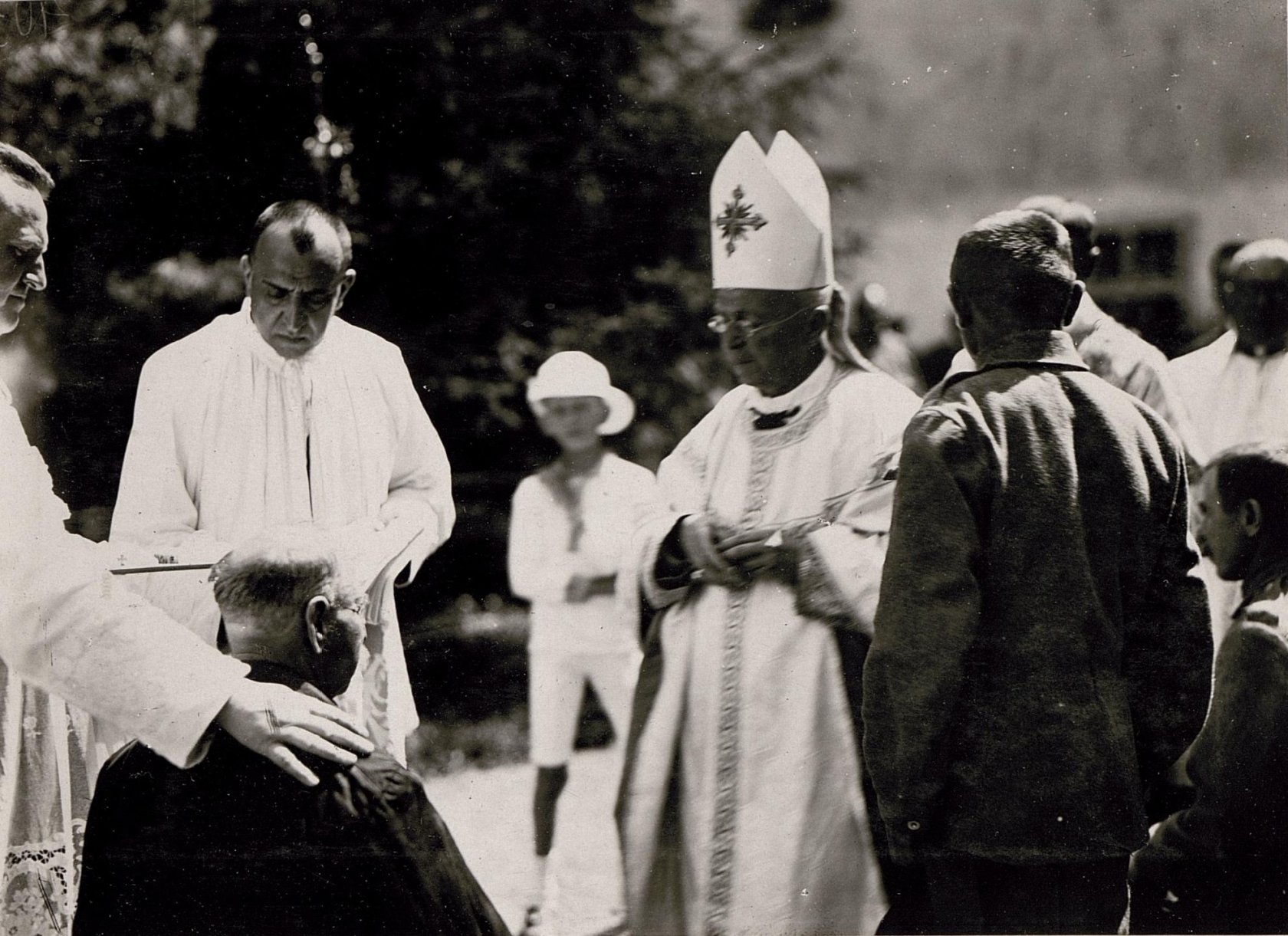 Erzbischof Graf Majláth in Bistritz